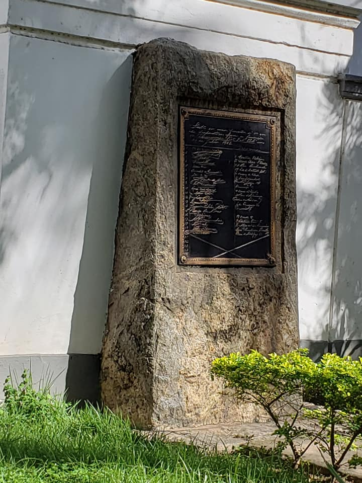 Homenagem aos fundadores do Fluminense Football Club na sede do clube.